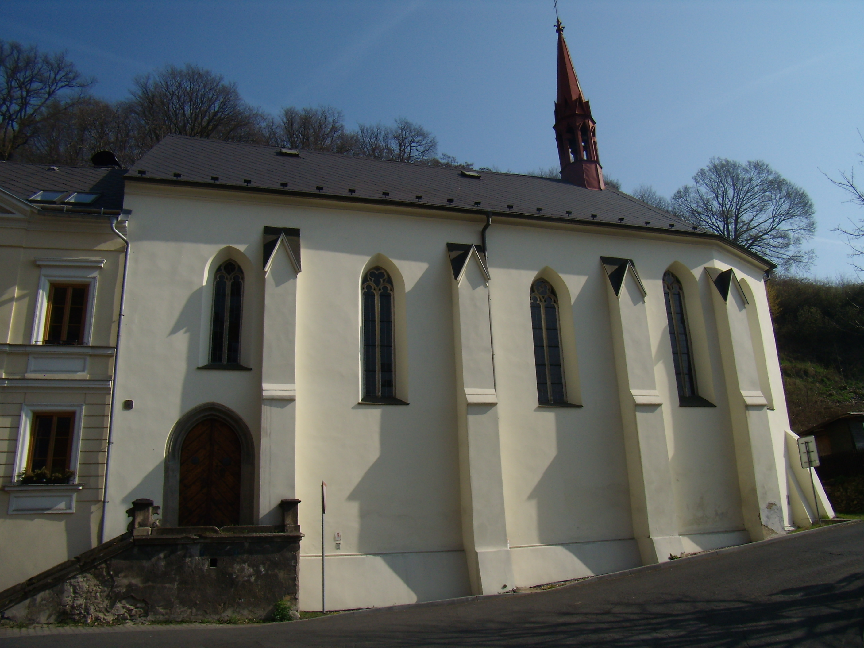 Kostel sv. Ducha (Krupka)